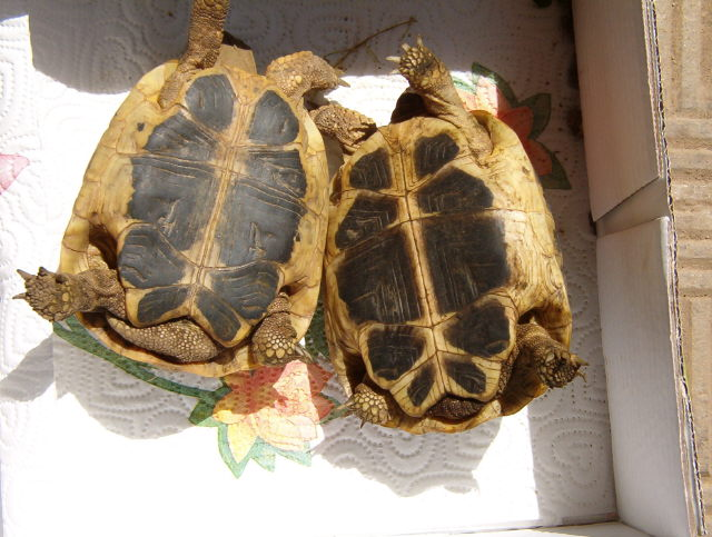 Tastudo hermanni hermanni, male left, female right, Sant'Antioco Sardegna Italy